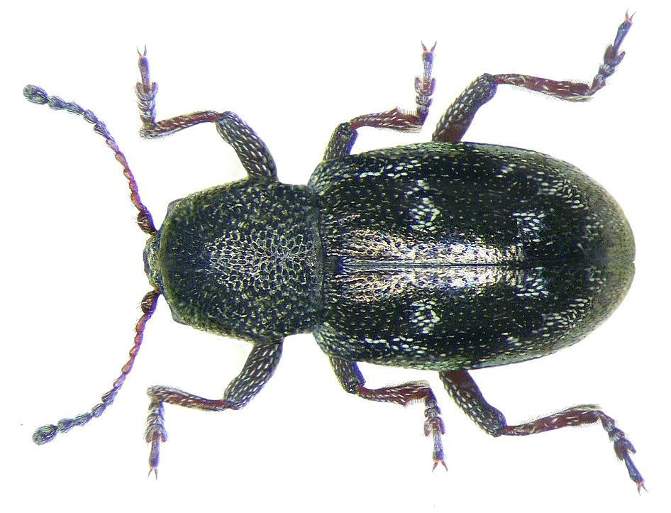 Pachnephorus villosus (Duftschmid, 1825) Familie: Chrysomelidae Groesse: 2,5-3,5 mm Verbreitung: Südeuropa, südliches Mitteleuropa Ökologie: in spärlichem Rasenwuchs, phyllophag Fundort: Jugoslavien, Montenegro, Sutomore leg. det. U.Schmidt, 1982 Photo: U.Schmidt, 2007